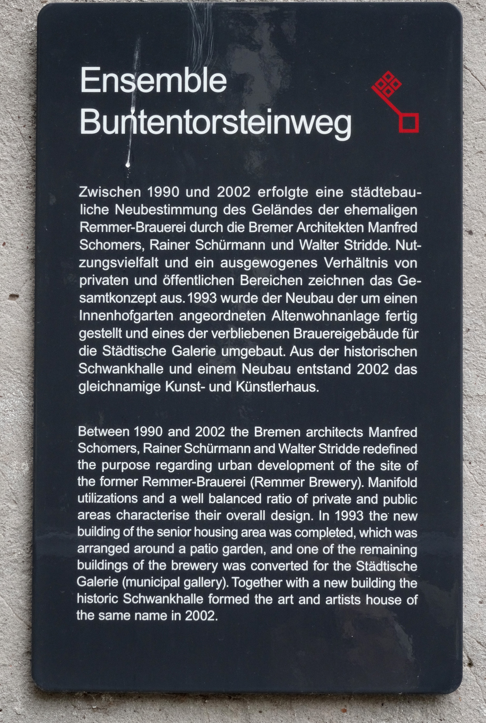 Infotafel: Ensemble Buntentorsteinweg 104-114 (Tafel 112)